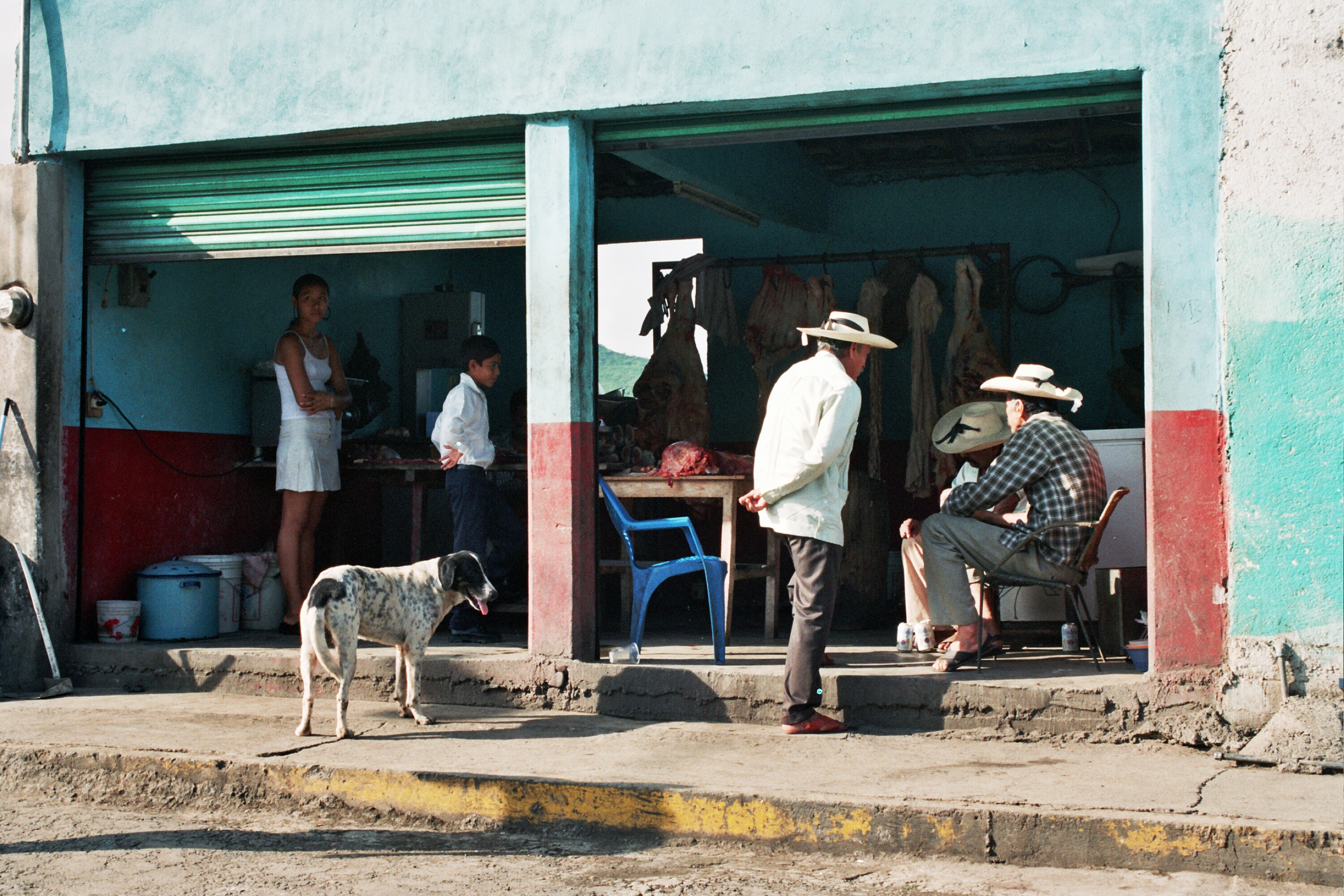 Metzgerei in Caracuaro, Mexiko: das Fleisch wird ungekühlt bei 30 Grad im Schatten gelagert. Sommer 2004